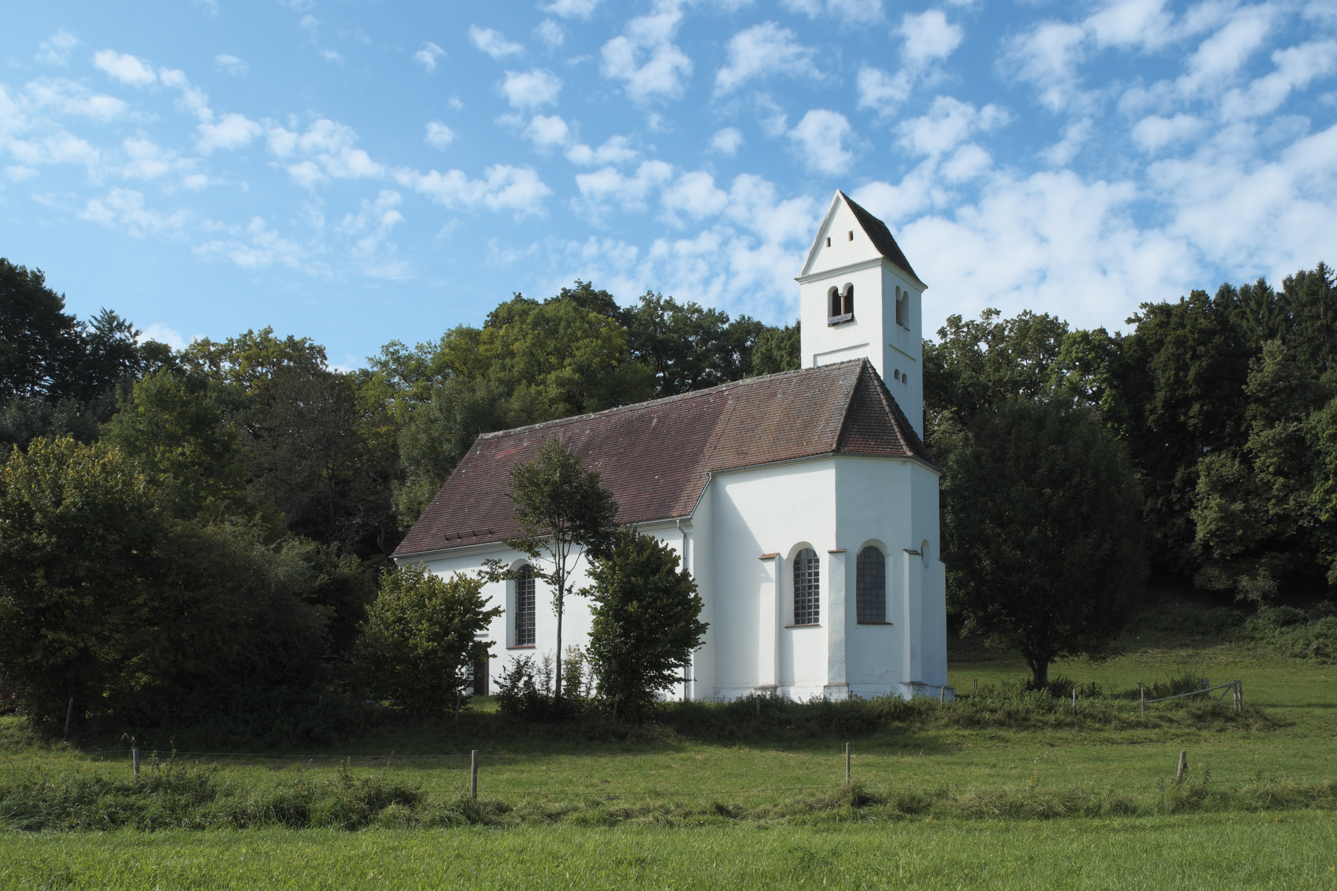 Katholische Filialkirche St. Stephan (Osteraufkirche) in Denklingen im Landkreis Landsberg am Lech (Bayern/Deutschland)